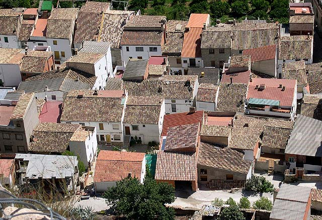 Localidad de Sot de Chera, en Valencia (España)